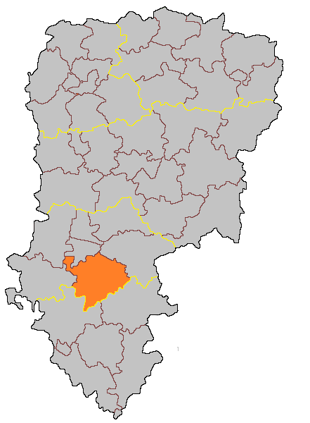 Кантон Ульши-ле-Шато на карте департамента Эна